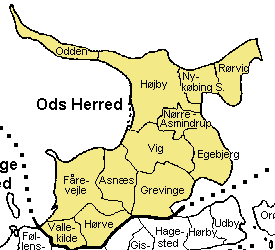 Ods Herred Holbæk Amt , Denmark. Map by Svend-Erik Christiansen, edited by user:Nico-dk .